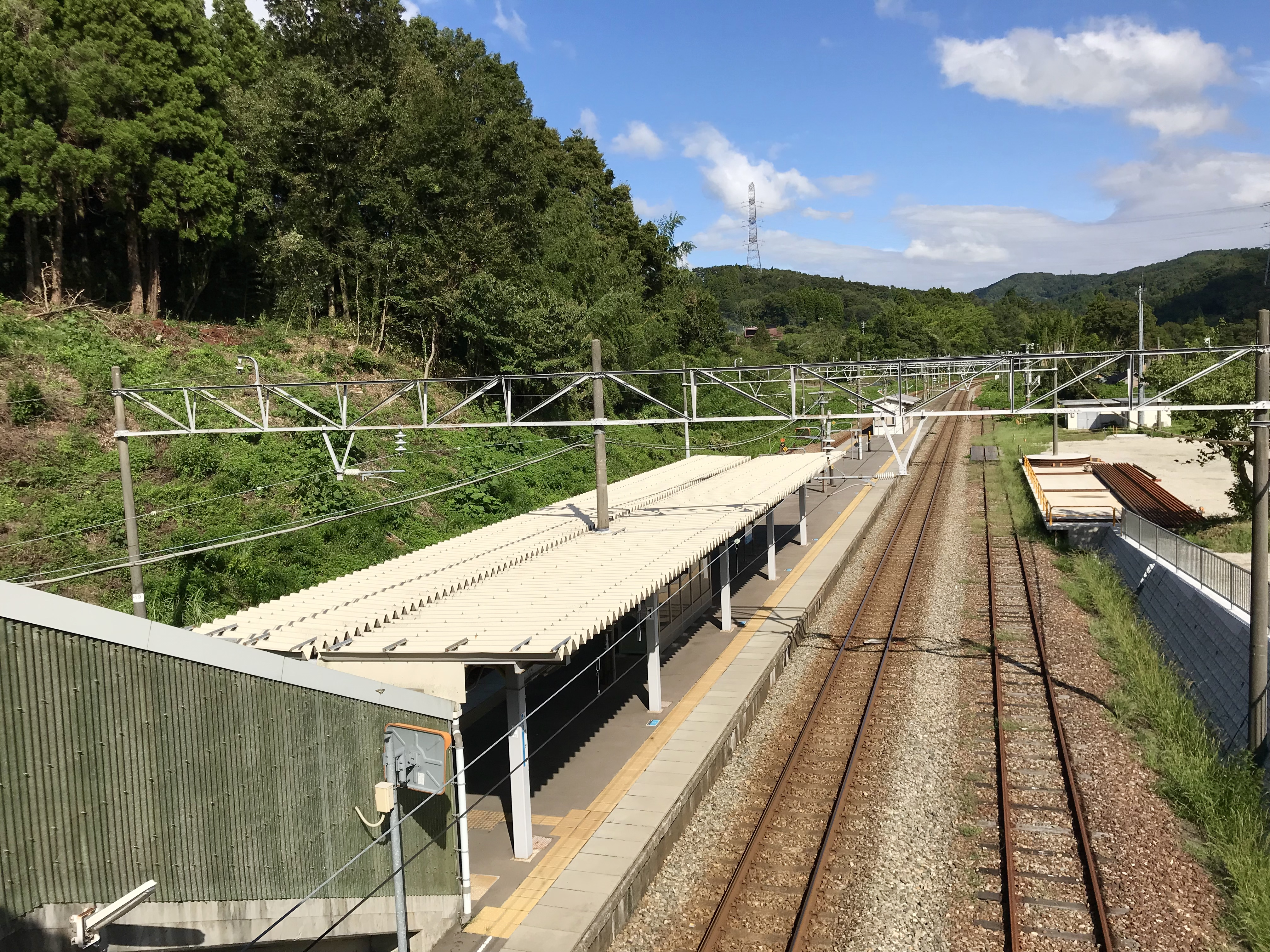 IRいしかわ鉄道倶利伽羅駅ホーム